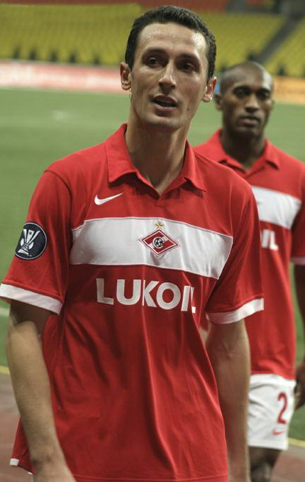 Florin Şoavă